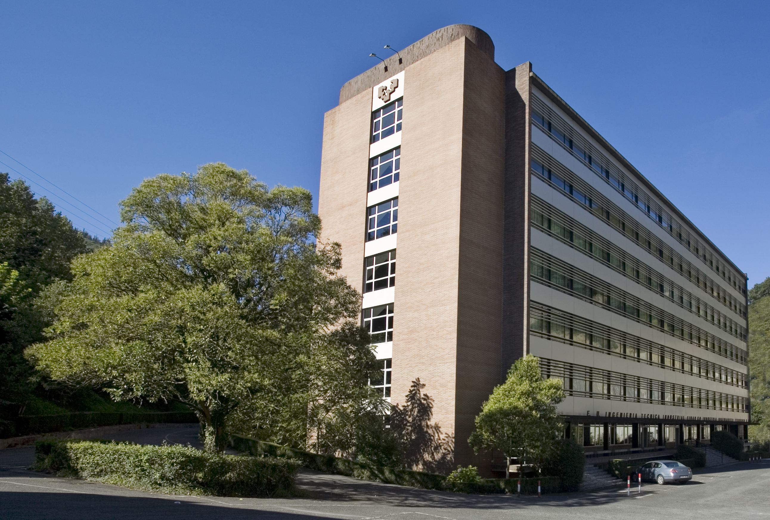 UPV/EHUko Gipuzkoako Ingeniaritza Eskola (Eibar)